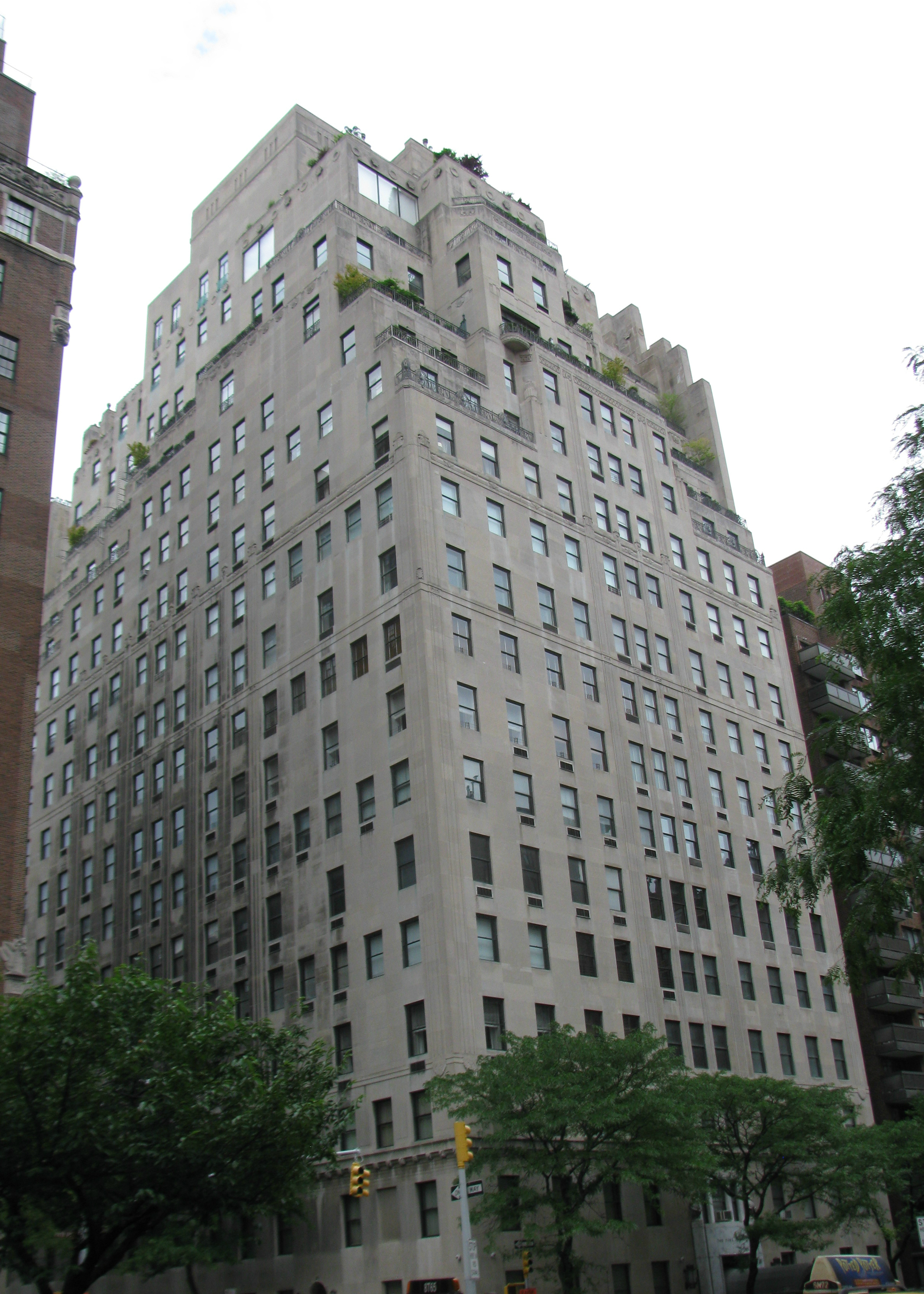 740 Park Avenue